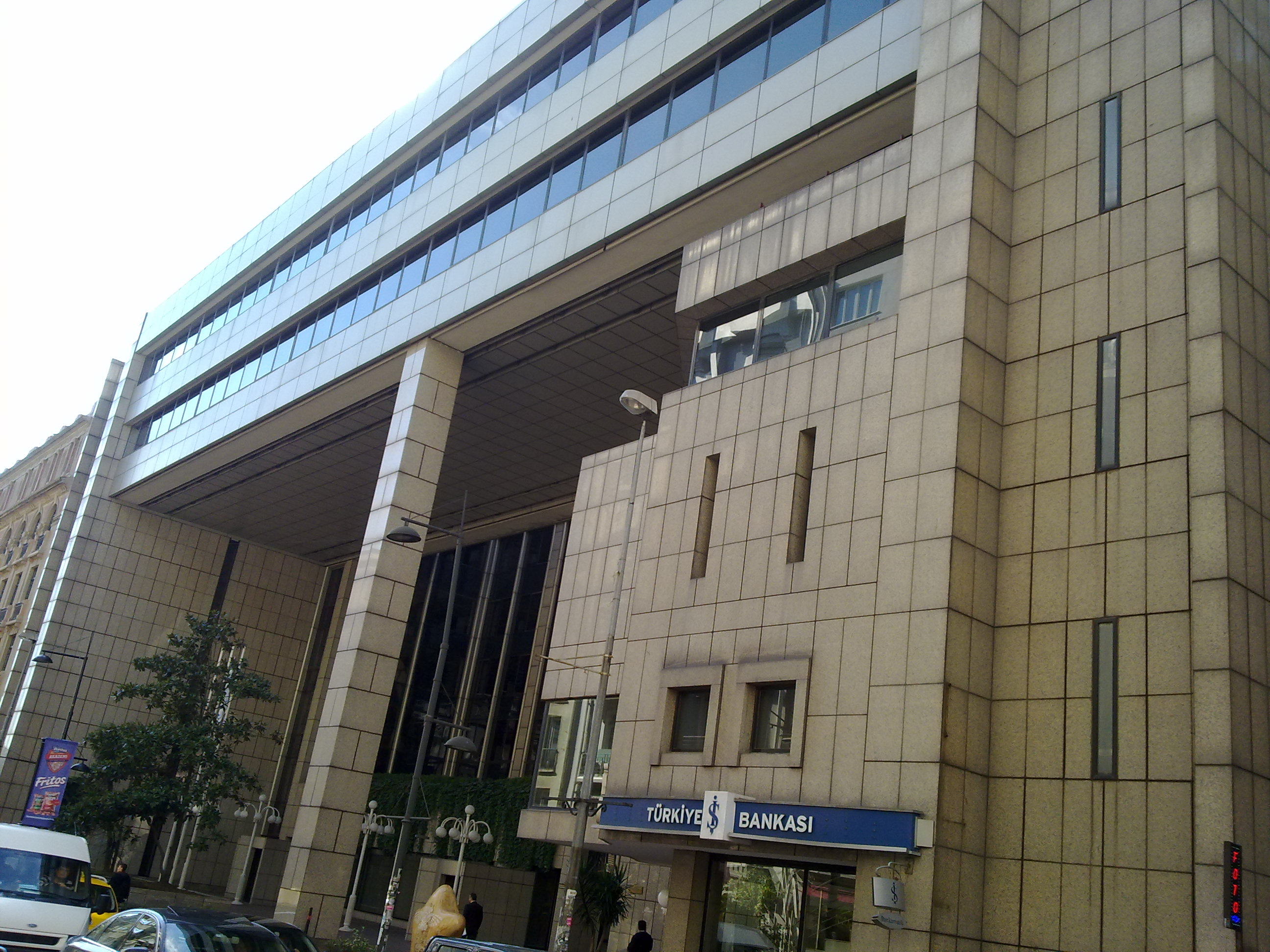 Millî Reasürans'ın Şişli Teşvikiye'de bulunan merkez binası